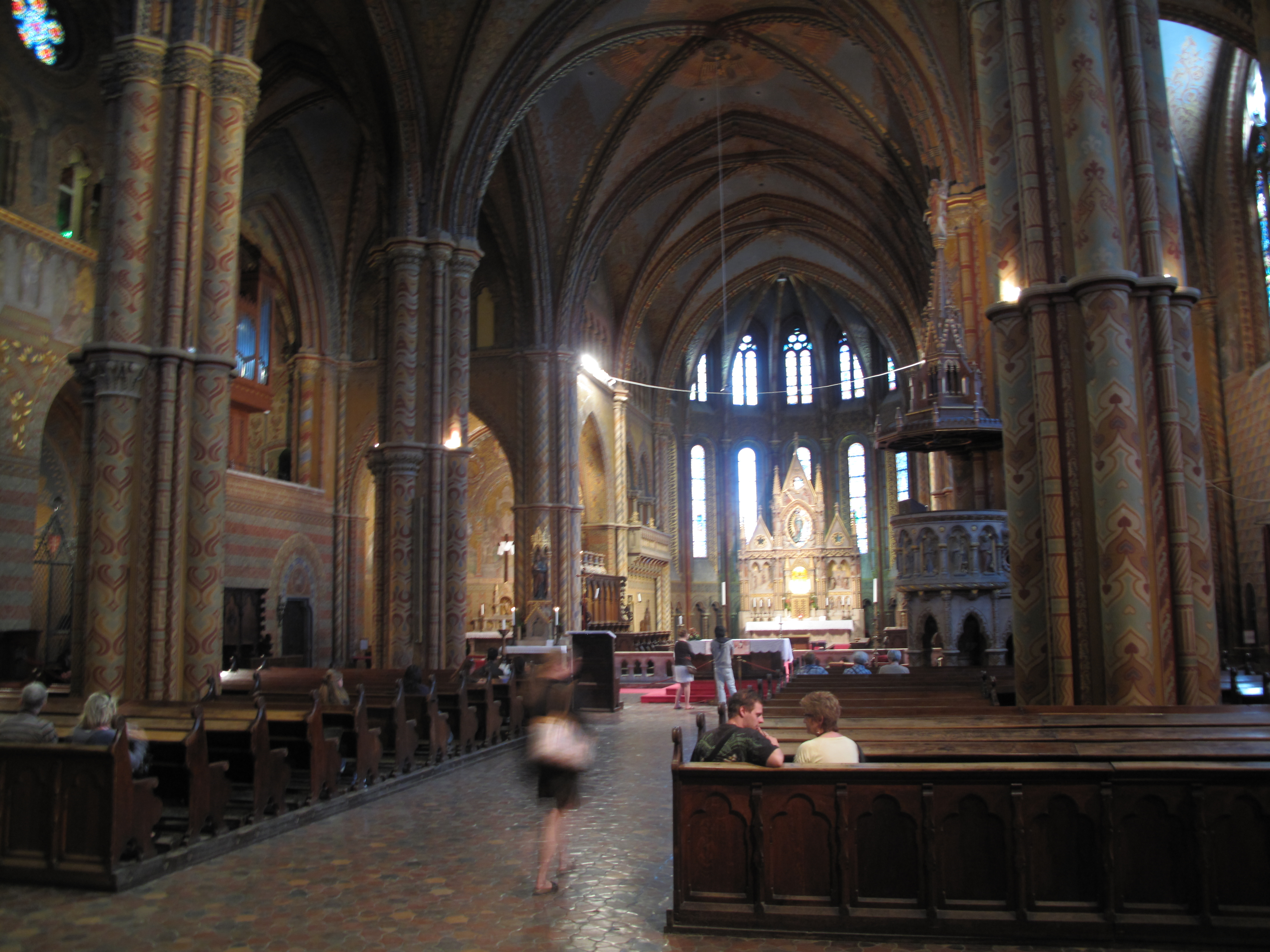 Budapešť